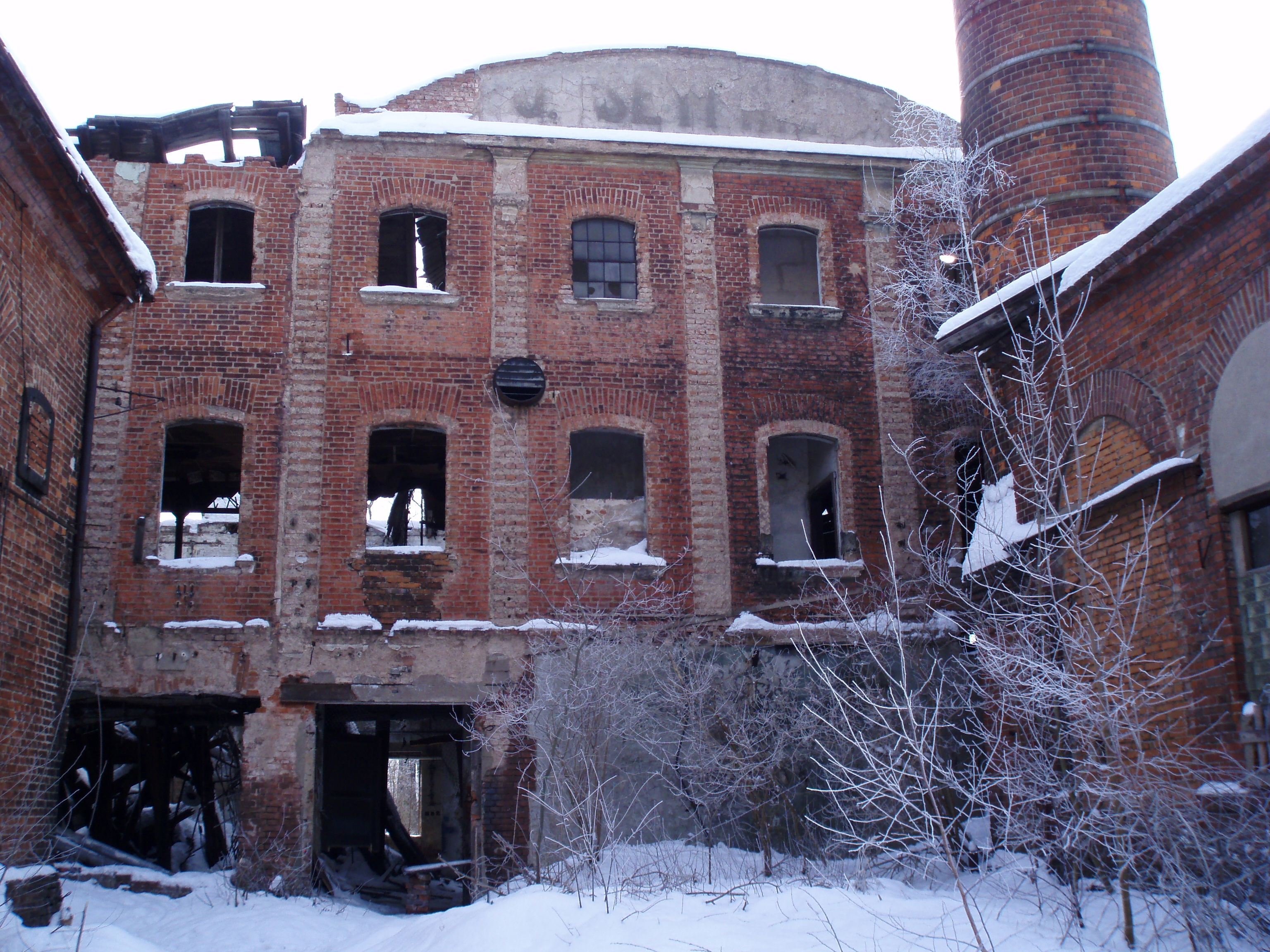 Kuklenská koželužna